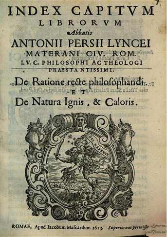 Index Capitvm Librorvm, 1613, Antonio Persio (1543-1612)